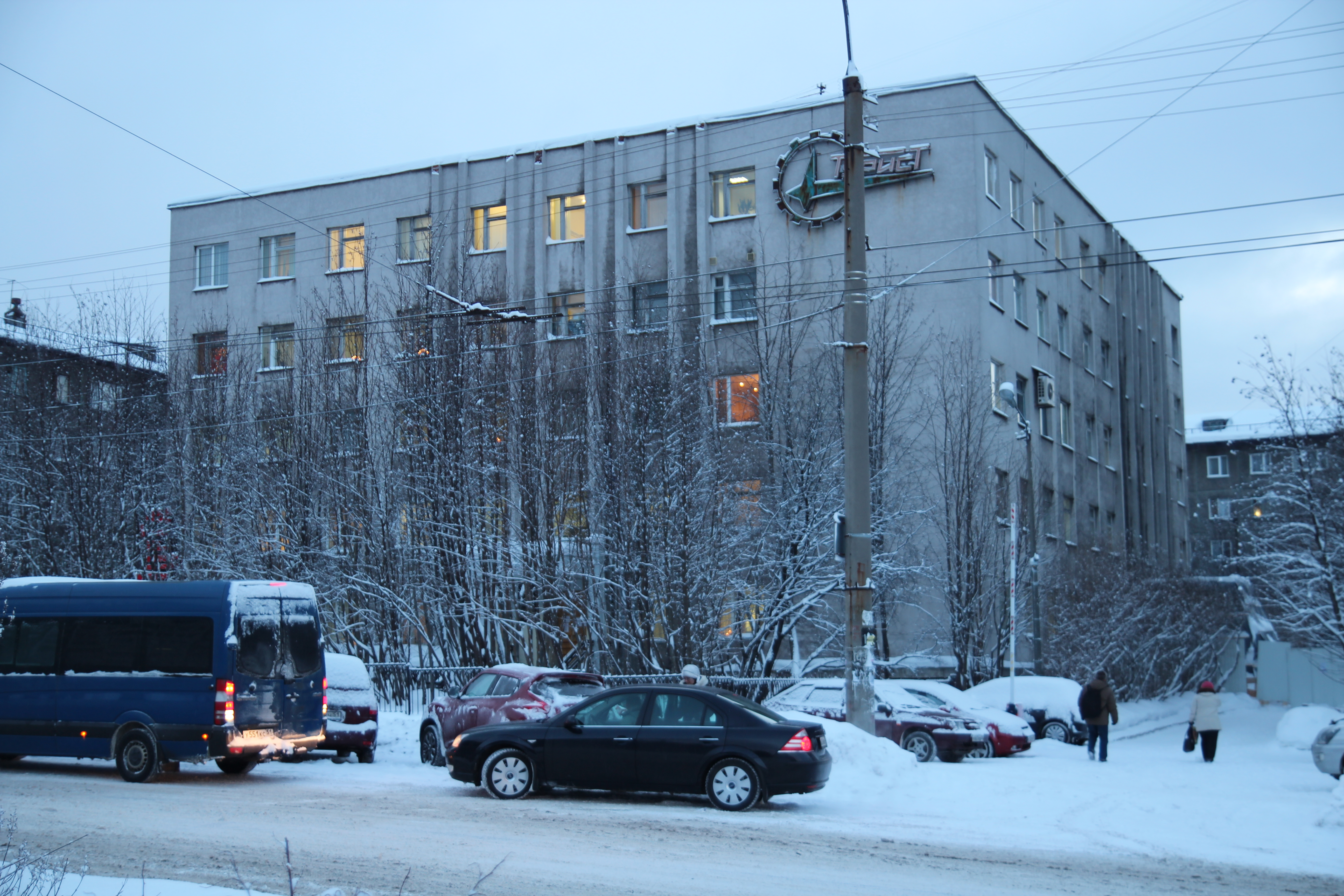 Здание консульства Финляндии в Мурманске